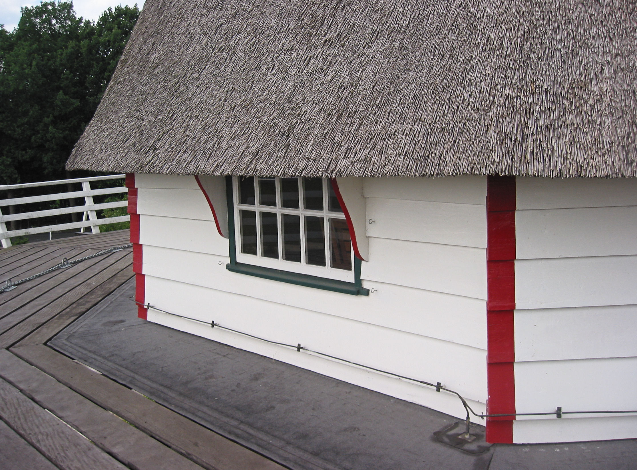 Molen De Hoop in Appel, onderkant achtkant, Gelderland, the Netherlands